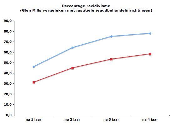 Recidive Glen Mills vergeleken met justitiële jeugdbehandelinrichtingen; grafiek gebaseerd op gegevens van WODC-recidivestudies "Recidivemeting Glen Mills" - september 2007